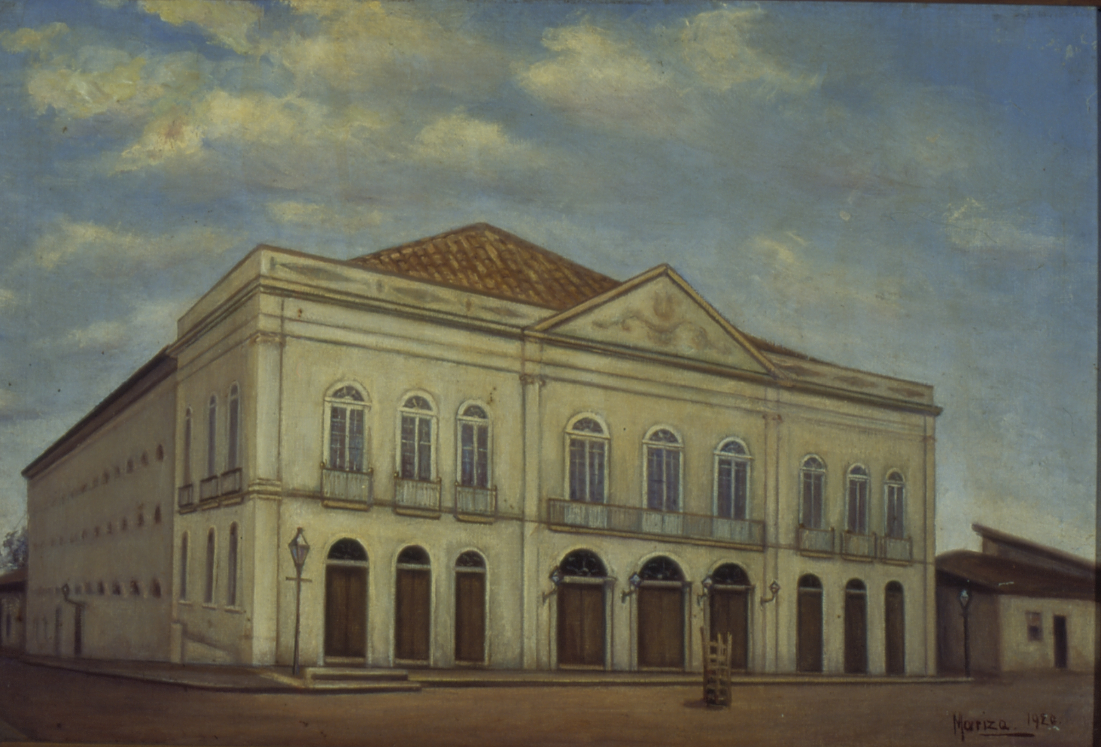 Obra que integra o acervo do Museu Paulista da USP. Coleção Fundo Museu Paulista.